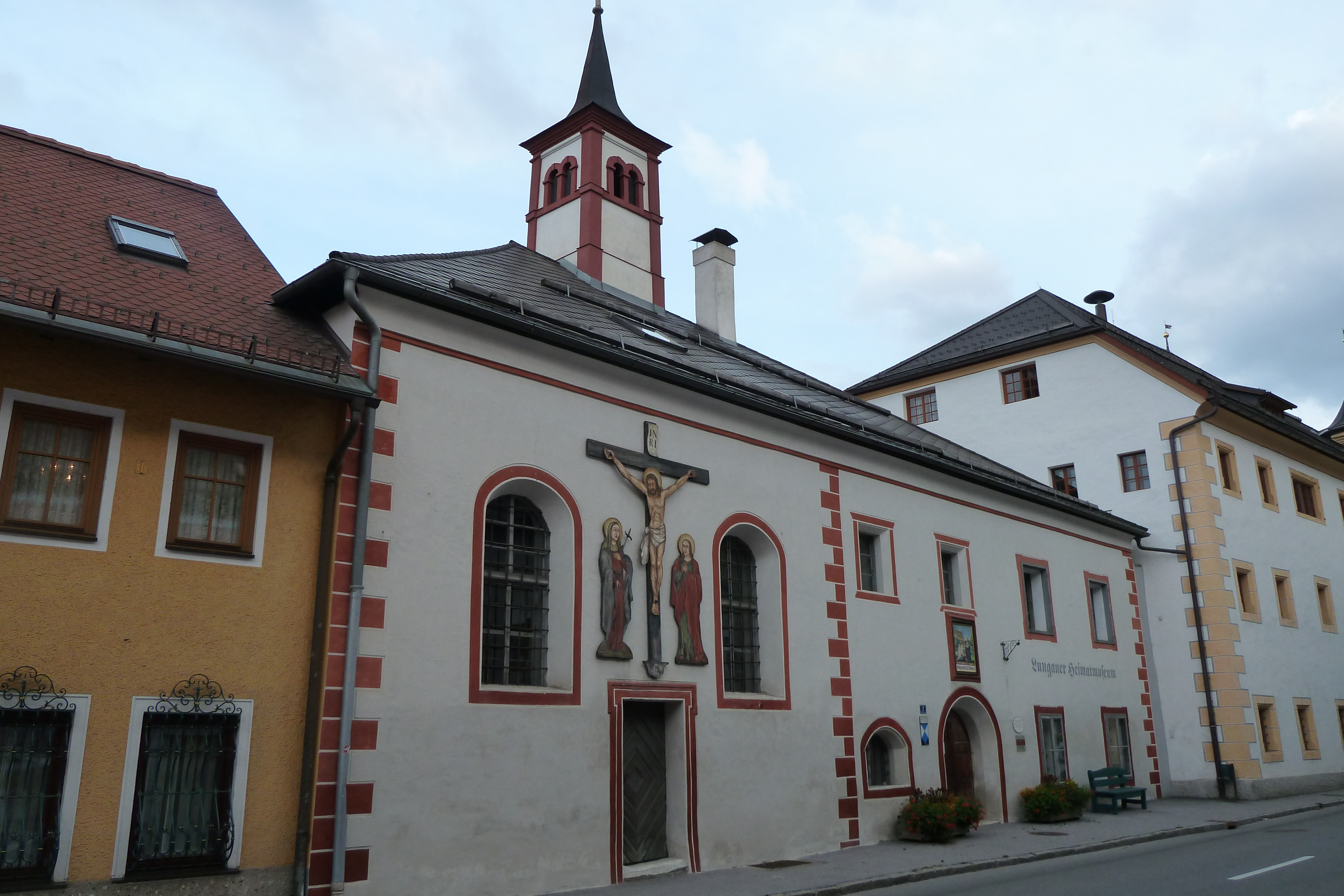 Ehemalige Spitalskirche Tamsweg, mit Lungauer Heimatmuseum, im Hintergrund Tamsweger Rathaus